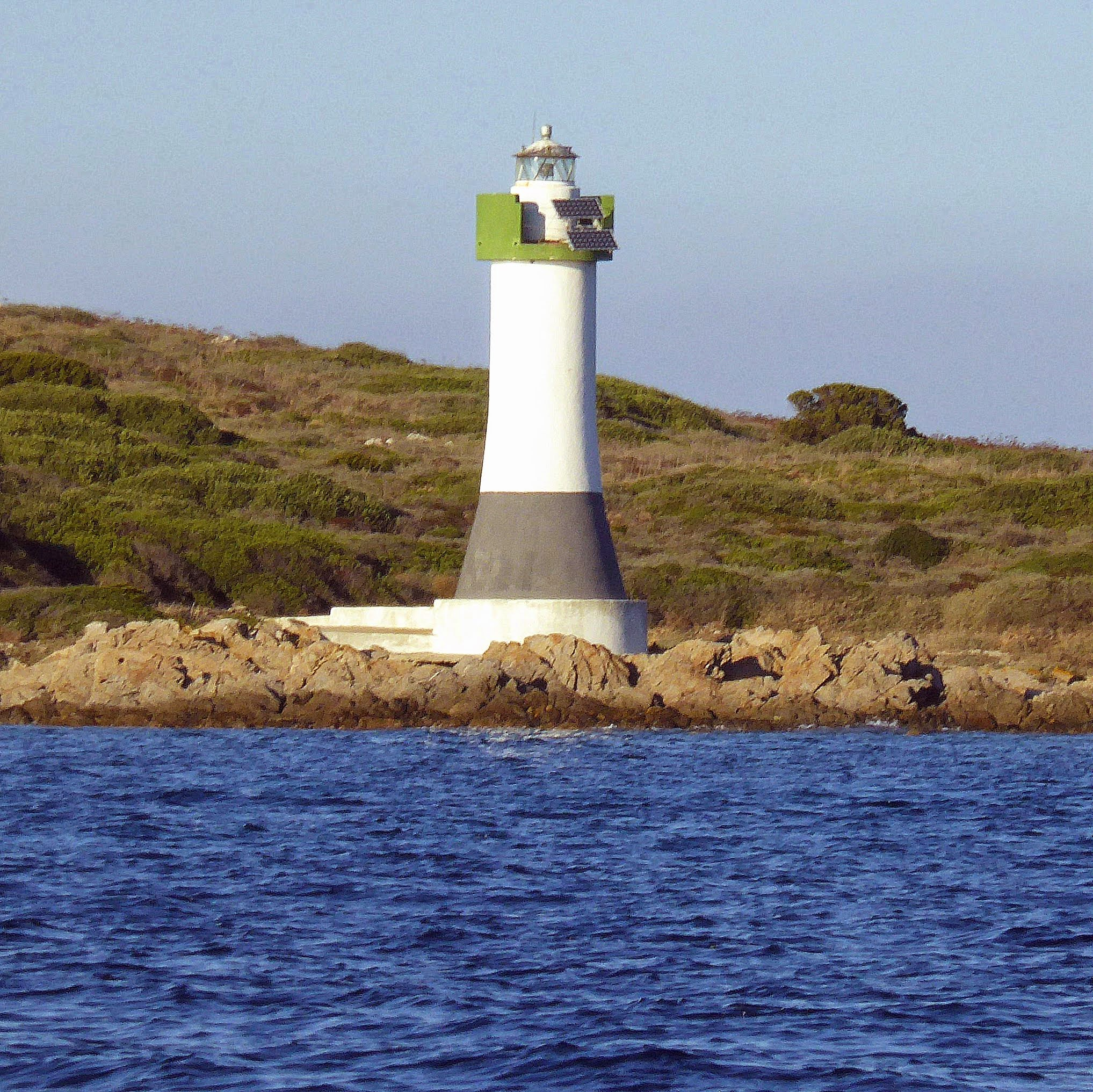 Arzachena - isola delle Bisce, Sardinien, Italy